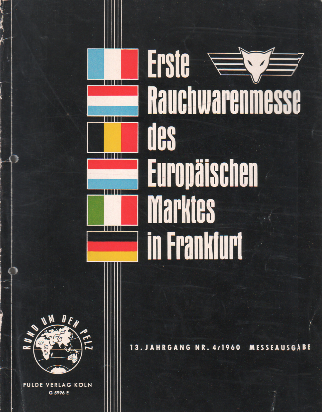 Erste Rauchwarenmesse des Europäischen Marktes in Frankfurt, 1960. “Rund um den Pelz”, Messeaugabe, 13. Jahrgang Nr. 4/1960 Messeausgabe Fulde Verlag, Köln 110 Seiten, 23,5 x 30,5 cm